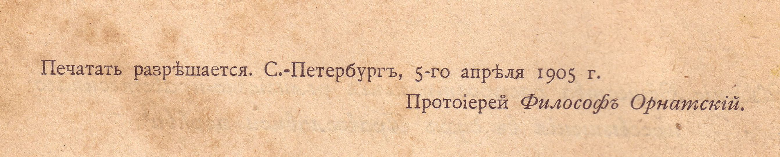 Разрешение духовной цензуры на печатание книги «Моя жизнь во Христе» Иоанна Кронштадтского. Оборот титульного листа.